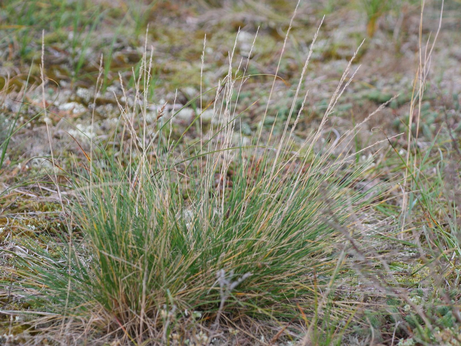 Dünen-Schafschwingel (Festuca polesica)